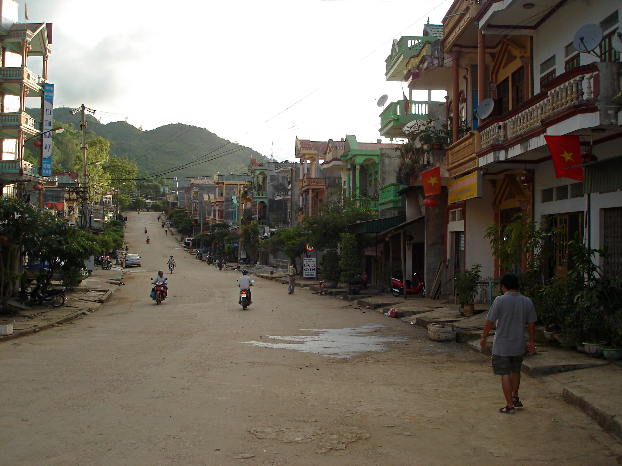 Hauptstrasse